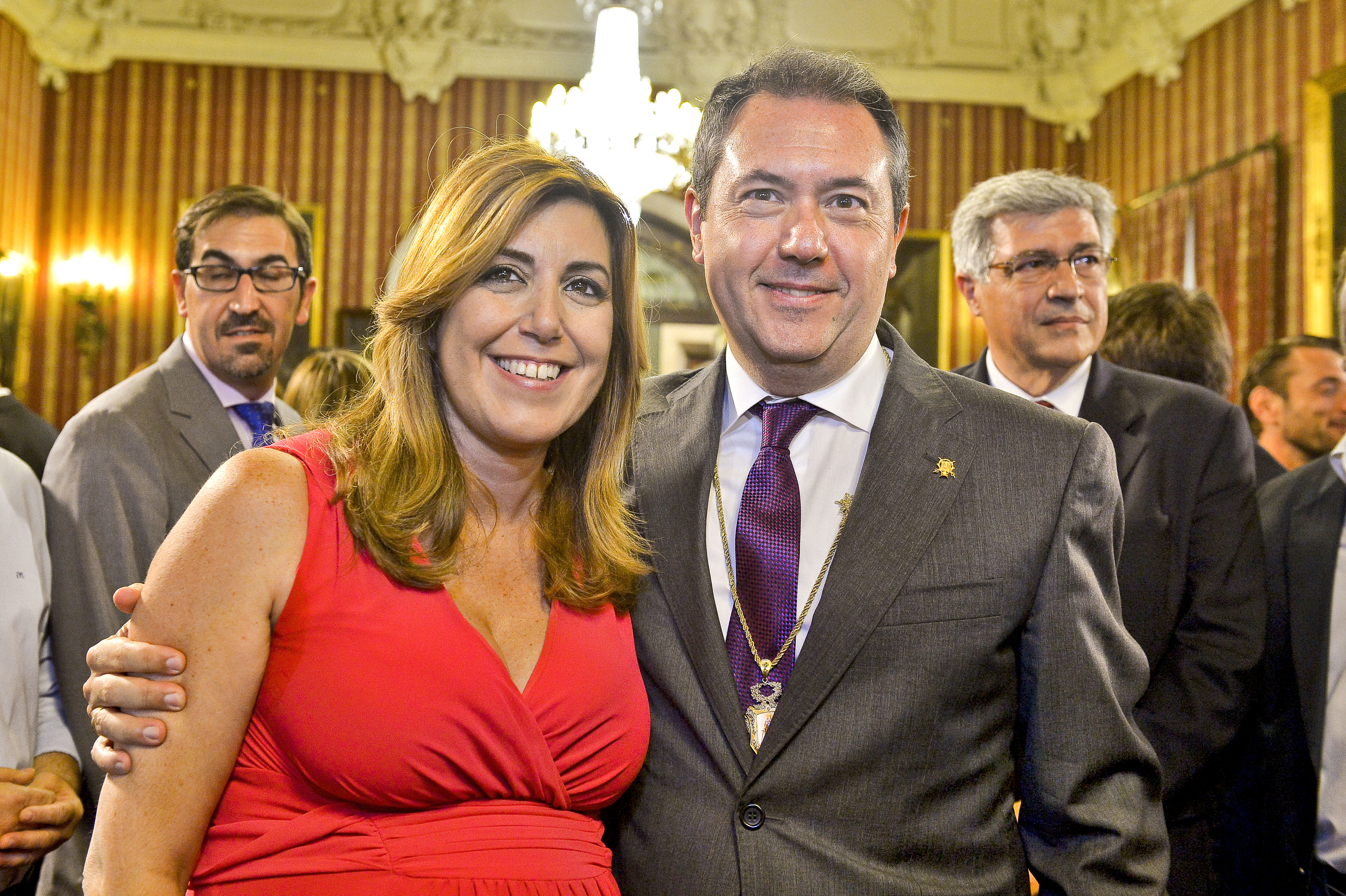 15.06.13-Toma-1-posesión Juan Espadas